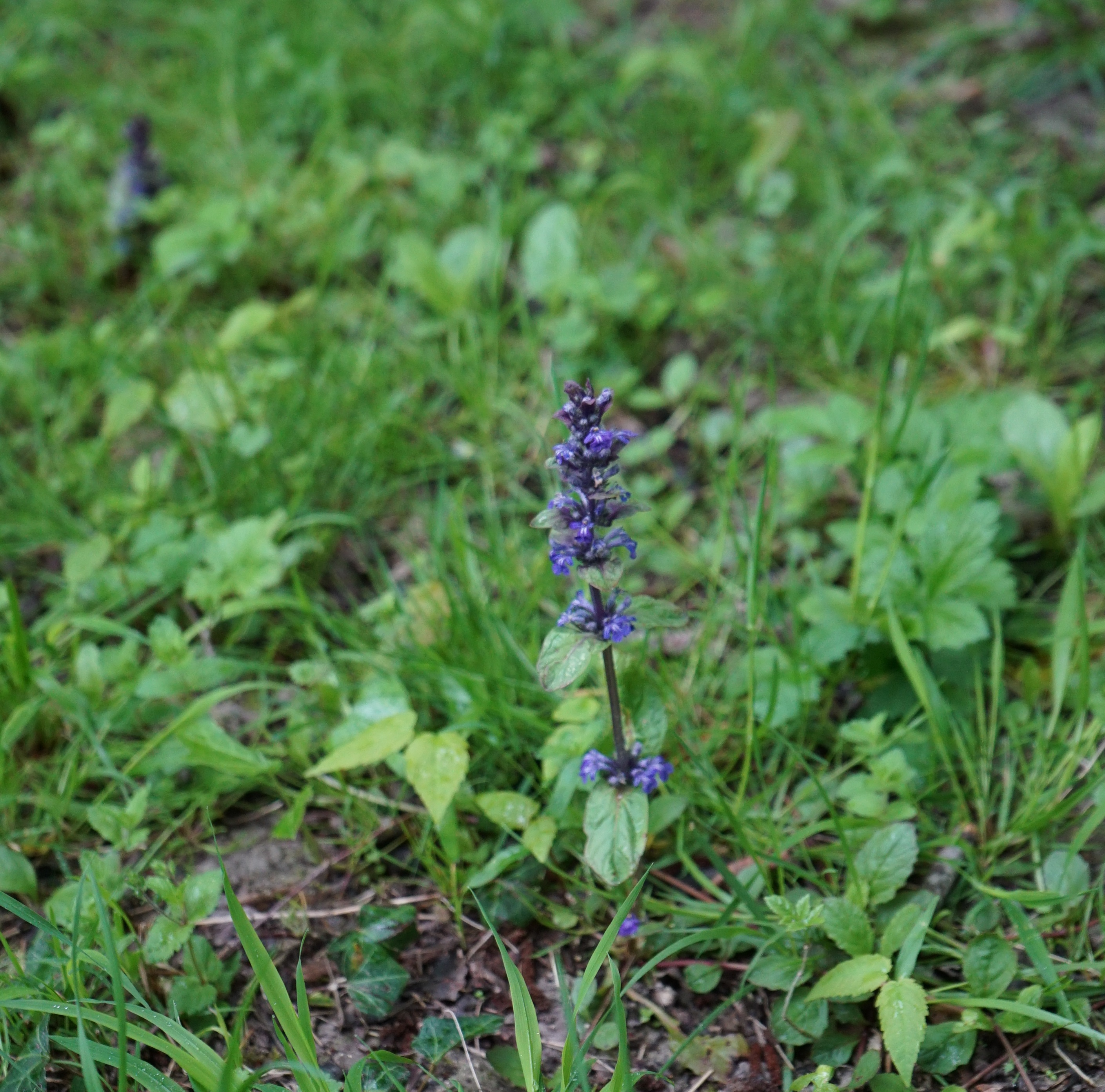 fleur de la Réserve naturelle régionale du marais les trous de Leu.